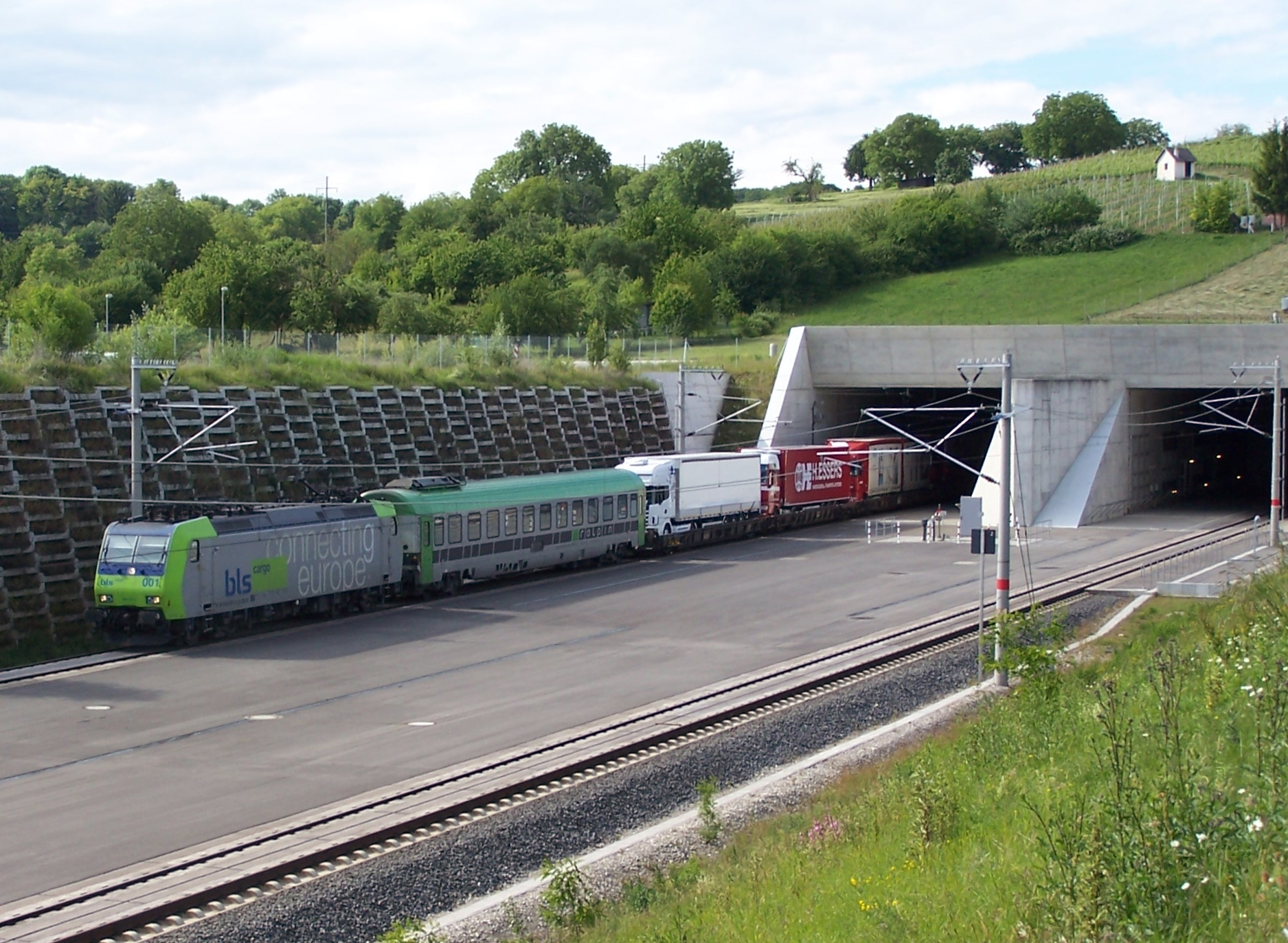 RoLa Zug am Südportal des Katzenbergtunnels gezogen von der BLS Re 485 001.